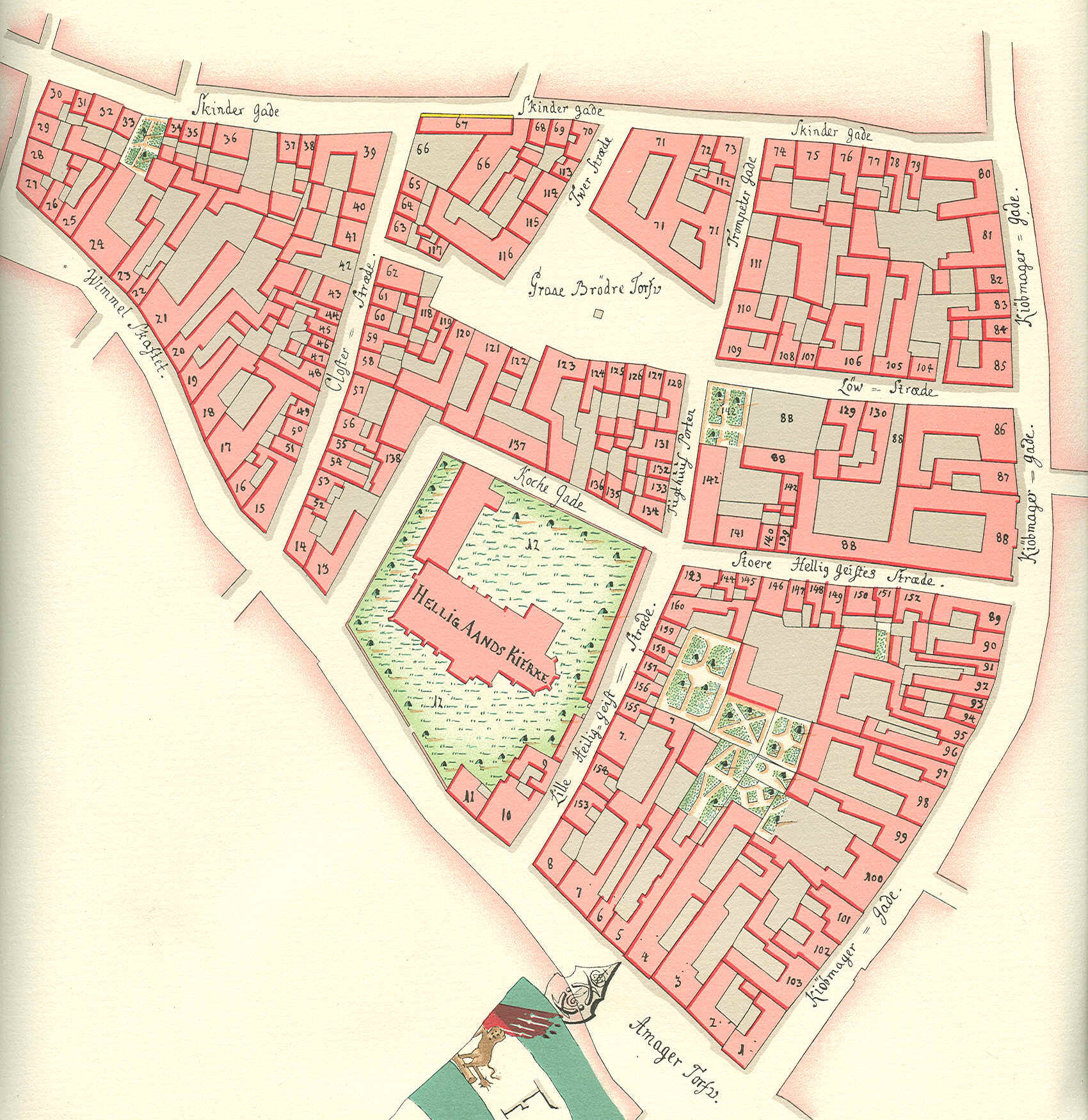 Helligåndskirken, Copenhagen, Denmark. Map by Gedde from 1757of Frimands kvarter.